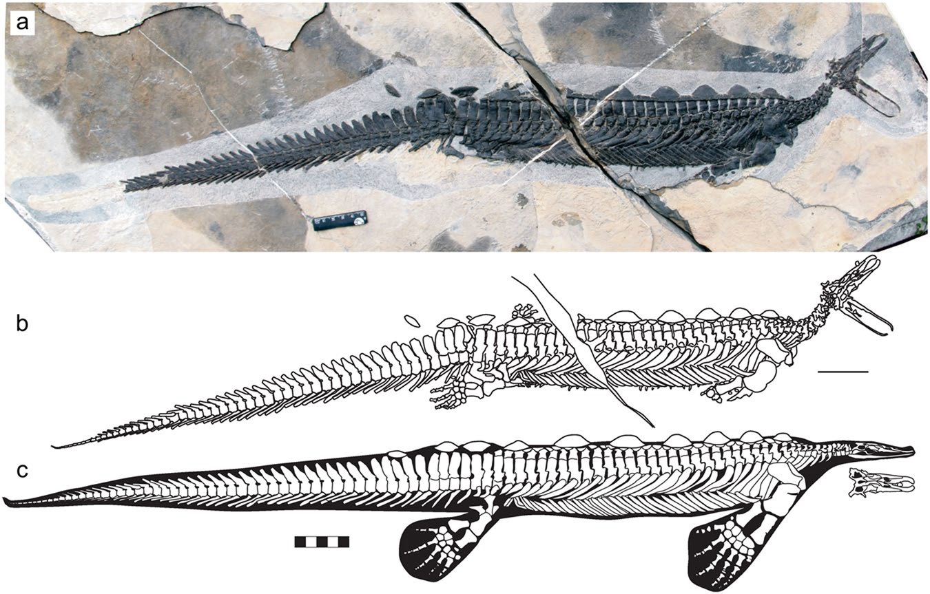 First nearly complete specimen of the rare hupehsuchian Eretmorhipis carrolldongi (YAGM V 1401), revealing an unusually small skull. (a) photograph. (b) outlines of the bones and impressions. (c) skeletal reconstruction, with flippers from the holotype. The ruler is 5 cm long.